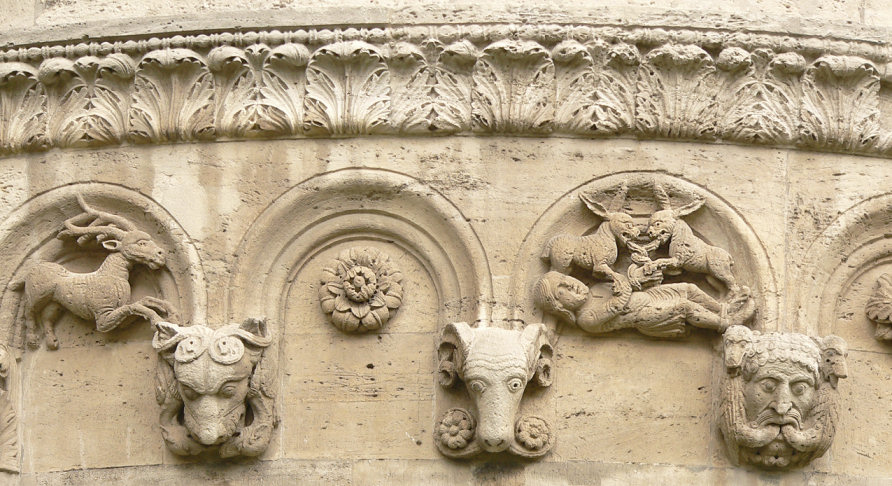 Jagdfries Kaiserdom Königslutter - Hasen haben einen Jäger erbeutet, 12. Jh.